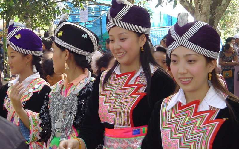 Хмонги в ЛаосеХмонгские девушки во время празднования Нового Года